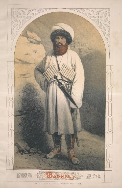 Shamil'.